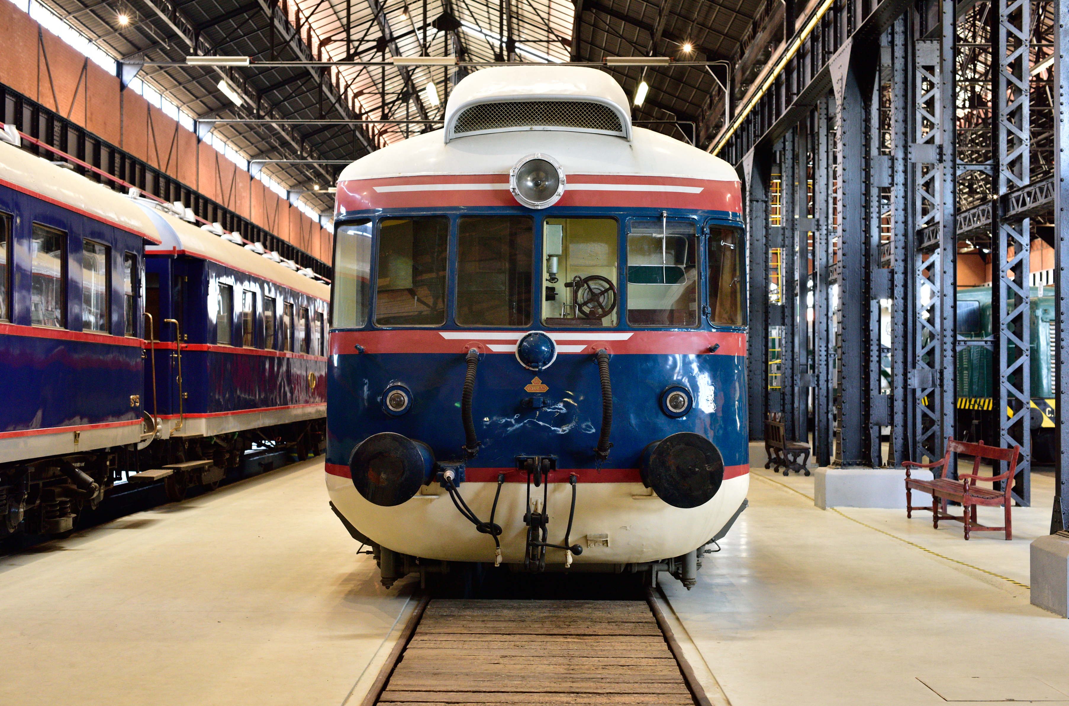 Museu Nacional Ferroviário National Railway Museum Entroncamento Portugal